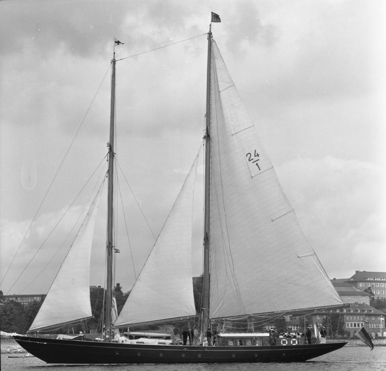 Kieler Woche 1962 Bundespräsident auf der "Ashanti" nimmt Parade von "Gorch Fock" deutschen und ausl. Kriegsschiffen ab